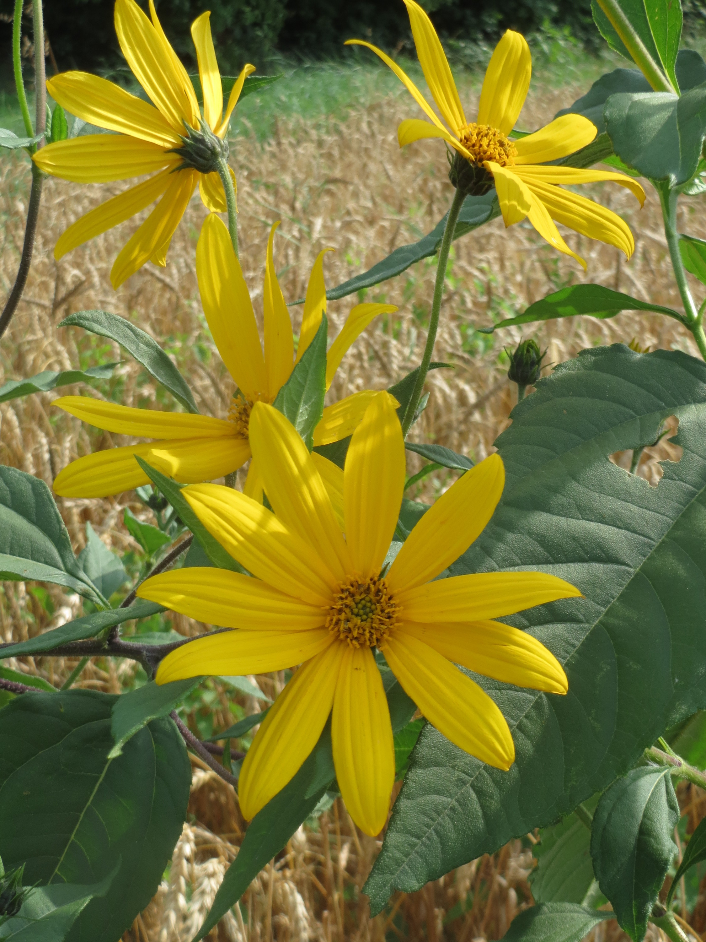 Verwilderter Topinambur (Helianthus tuberosus) in Hockenheim